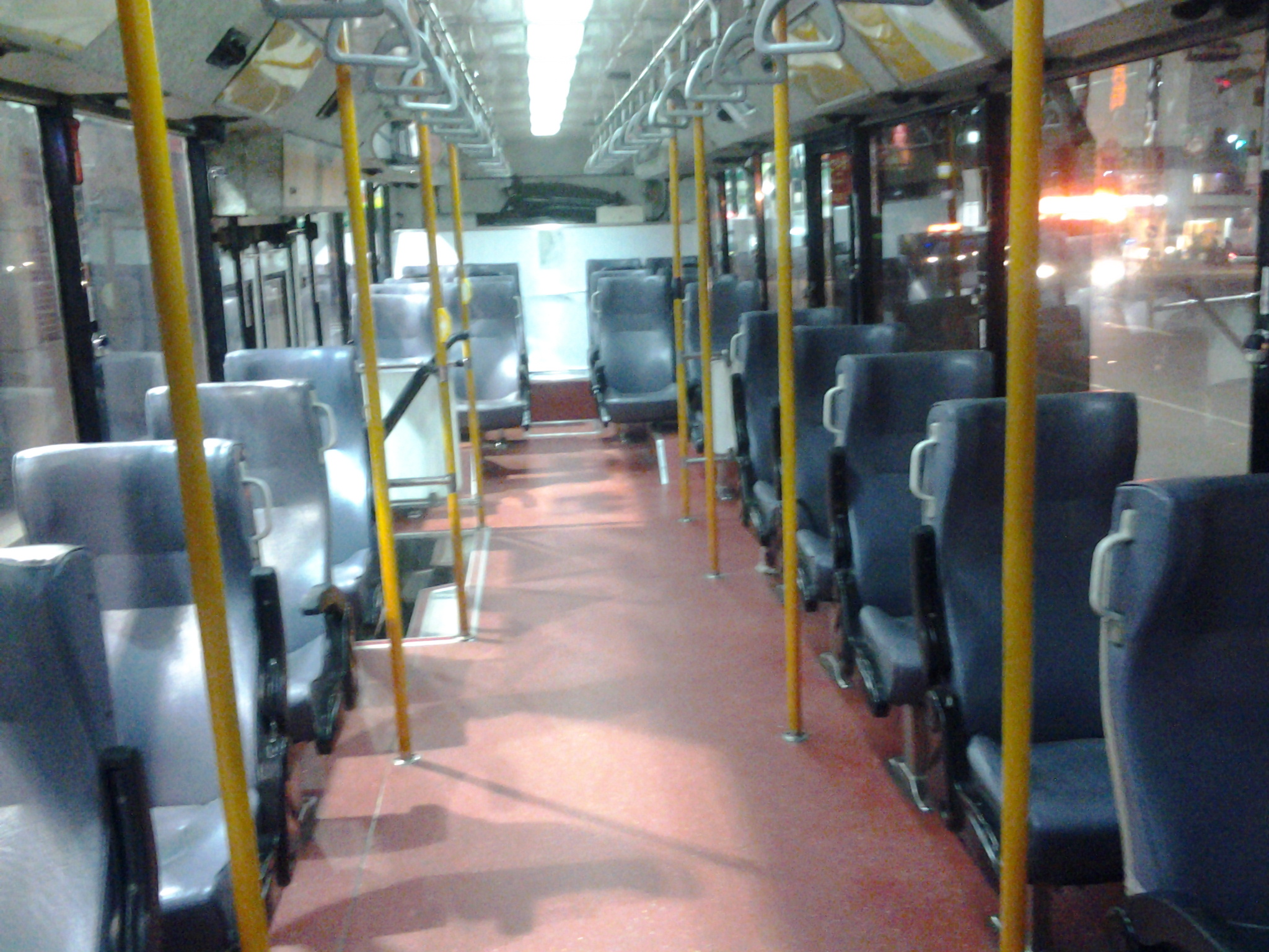 2002〈2011〉 HINO ERK2JRL（固特）